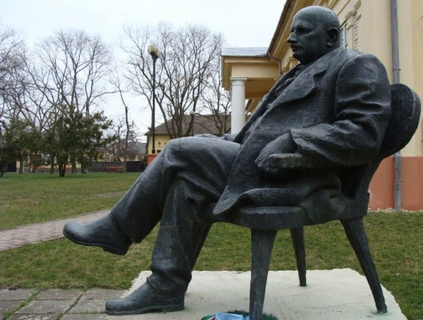 Györffy István néprajzkutató szobra, Karcag, 1984. Györfi Sándor szobrász alkotása.